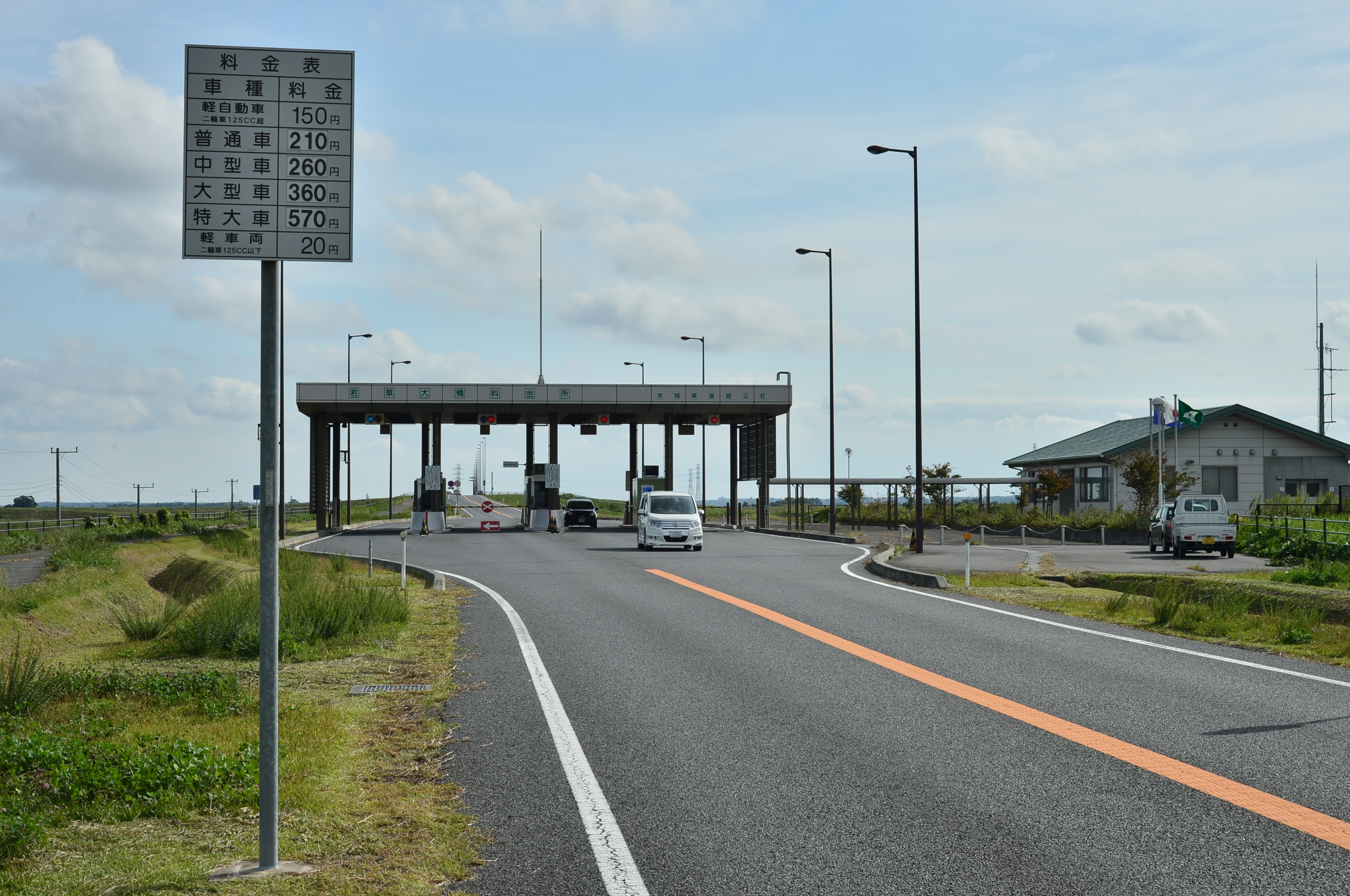 若草大橋料金所。茨城県側から見る。